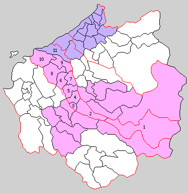 滋賀県神崎郡の町村制時点の町村。